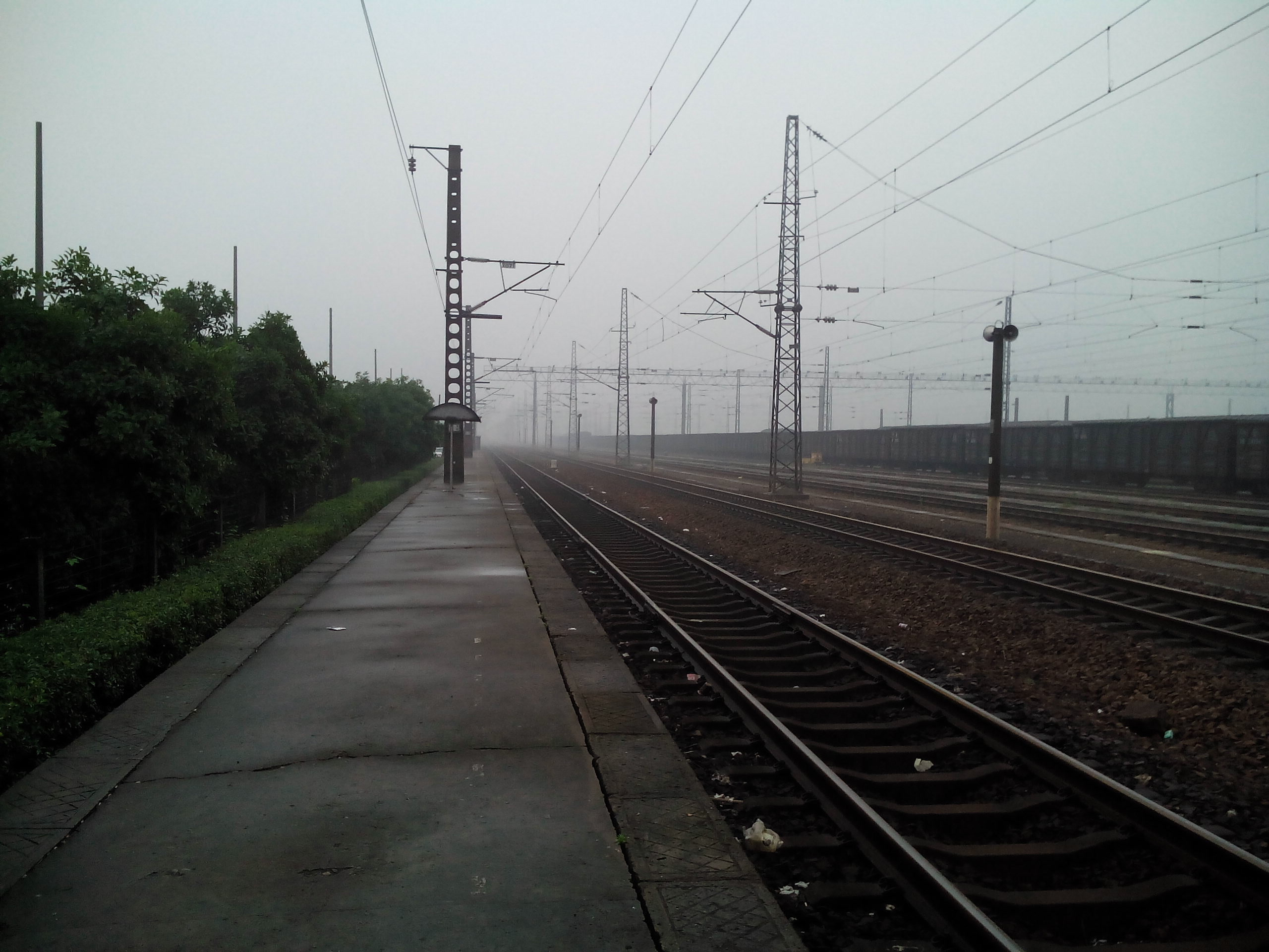 201405乔司站站场